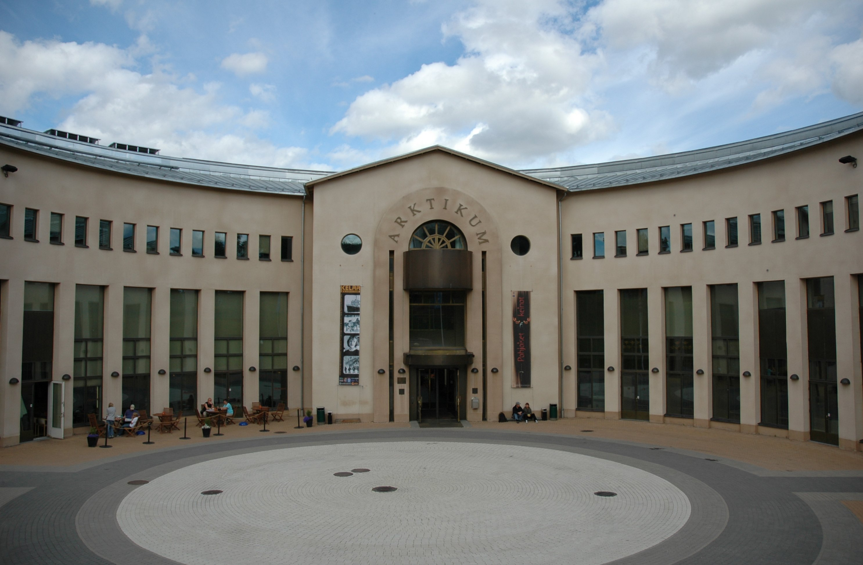 Artikum Museum on Rovaniemi, Finland